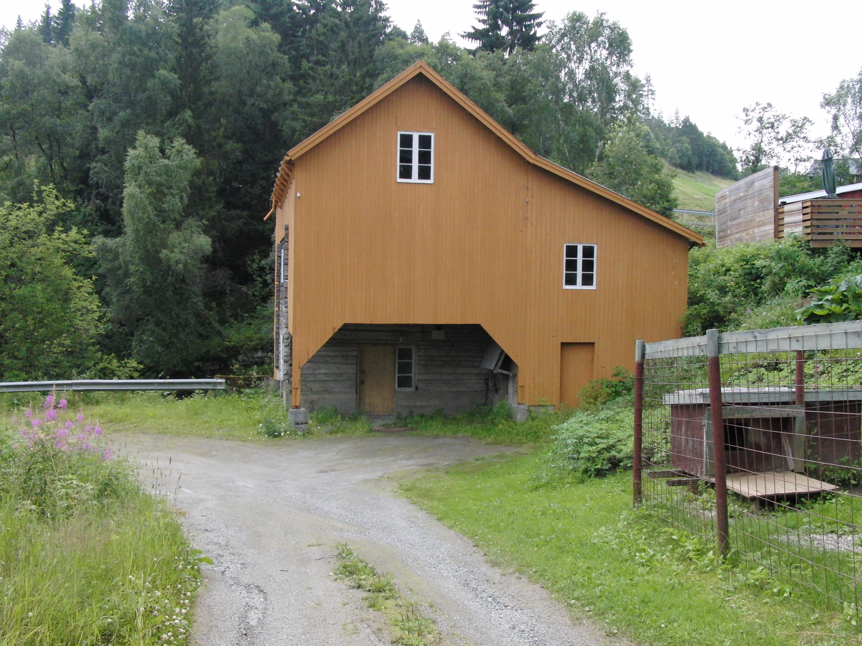 Fossum Mølle og elektrisitetsverk